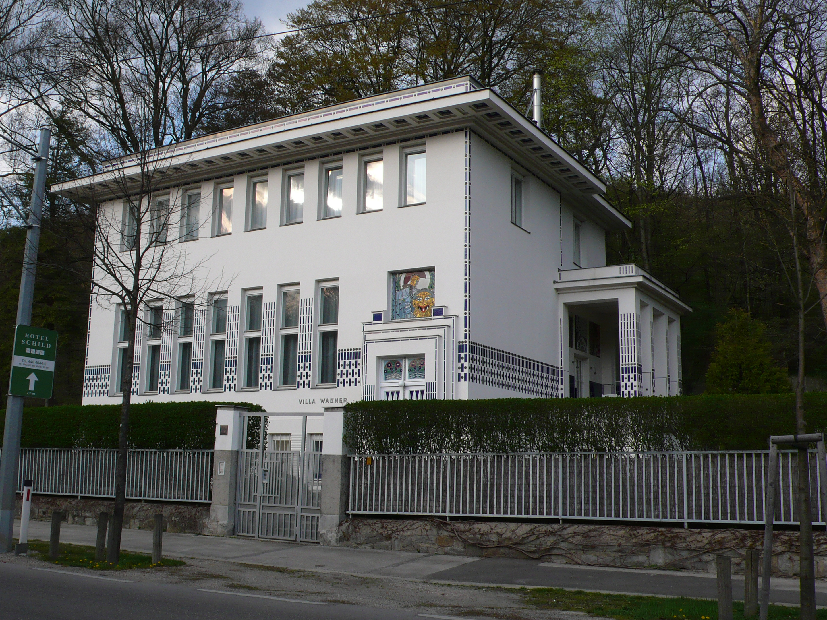 Zweite Wagner Villa, Wien, Otto Wagner